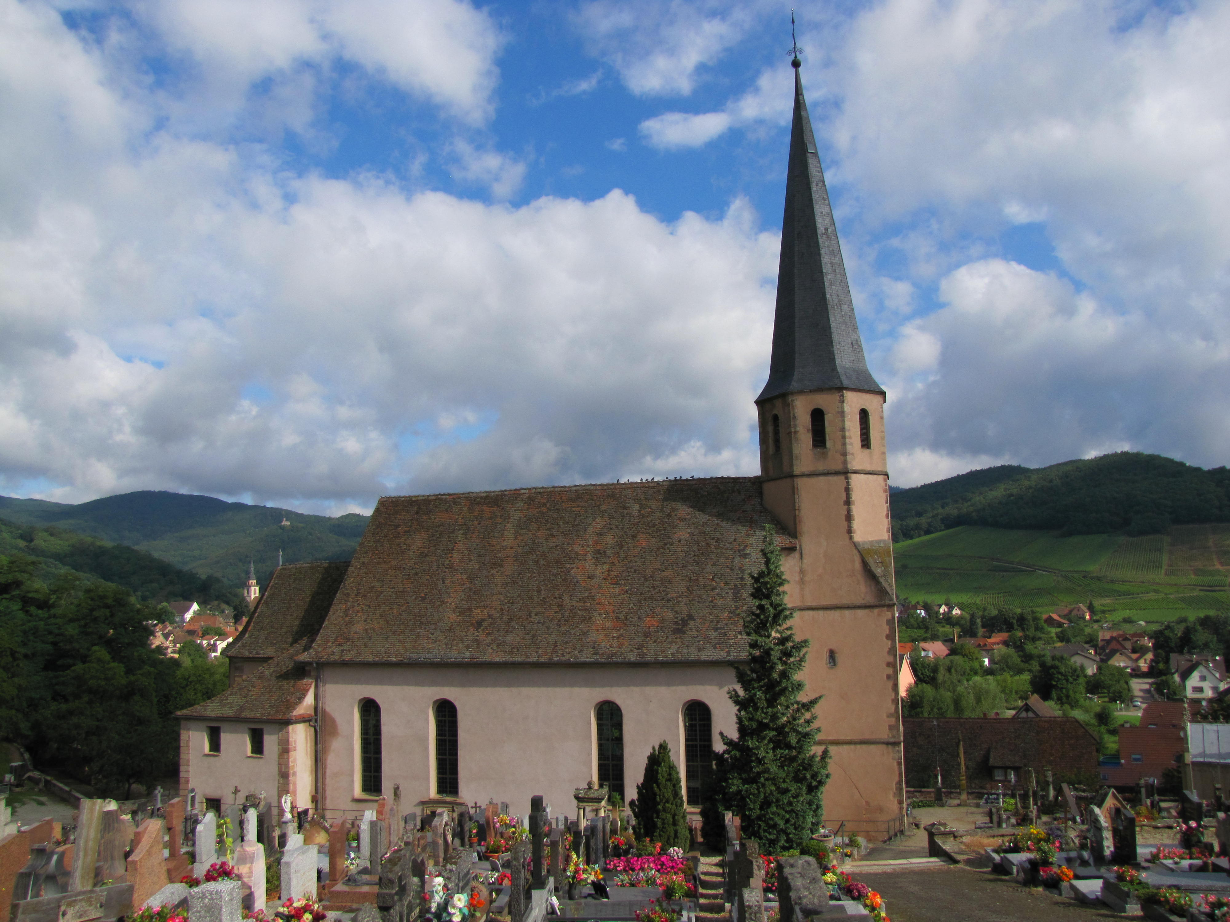 Alsace, Bas-Rhin, Andlau, Chapelle Saint-André (XIIIe).